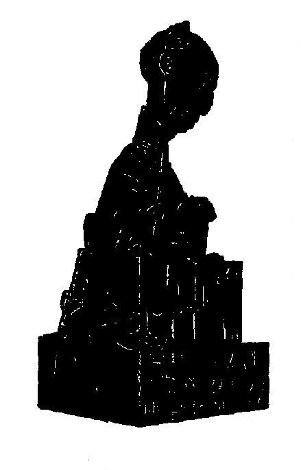 Portrait charge du docteur Orfila dominotier, par Dantan jeune. Reproduit dans : John Grand-Carteret, Vieux papiers, vieilles images, cartons d'un collectionneur..., éditeur : A. Le Vasseur, Paris 1896, page 312.